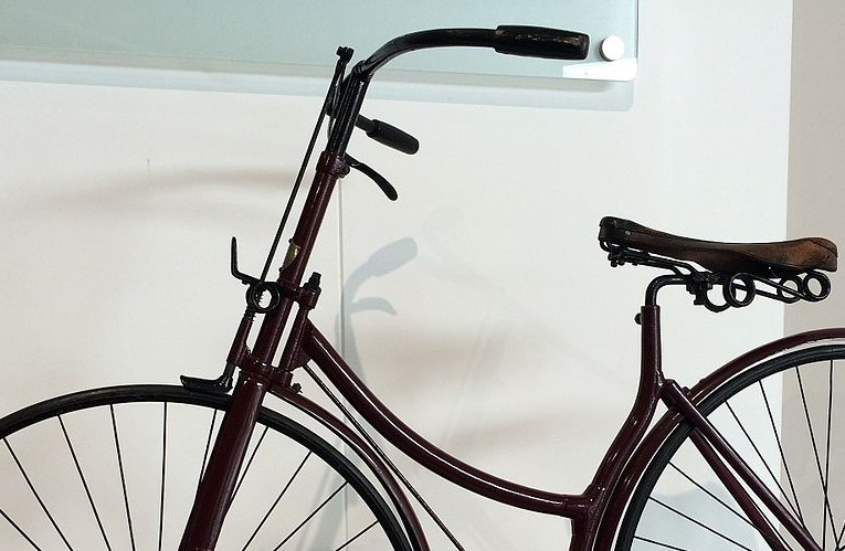 Nackensteuerung Ausschnitt, Rover III 1886